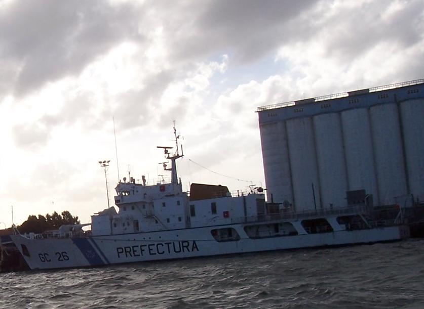 Barco perteneciente a la Prefectura Naval Argentina (PNA) en el puerto de la ciudad de Mar del Plata, Buenos Aires.